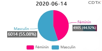 Covid.19: Distribution par sexe de cas confirmés 2020/06/14